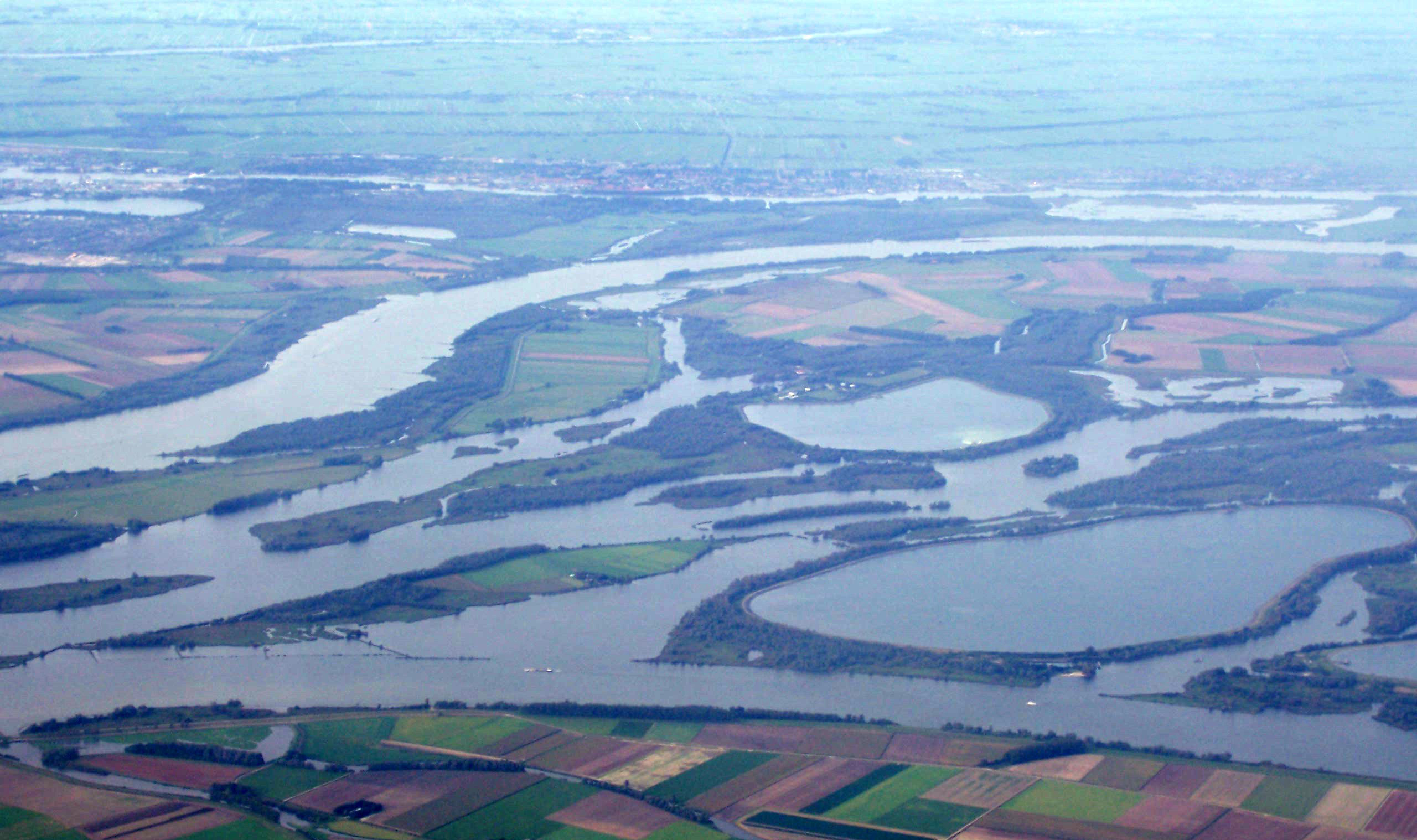 Luchfoto van de Biesbosch